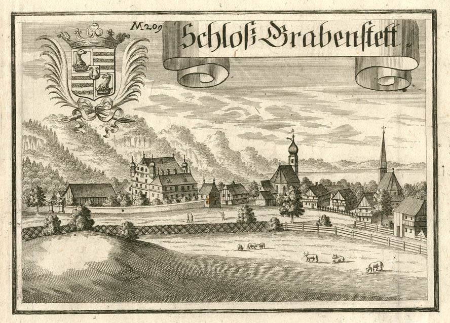 “Schloß Grabenstett” (Grabenstätt am Chiemsee), aus: Beschreibung des Churfürsten- u. Hertzogthumbs Ober- und Nidern Bayrn, Rentamt München, 2. Auflage um 1750 (1. Auflage von 1701)